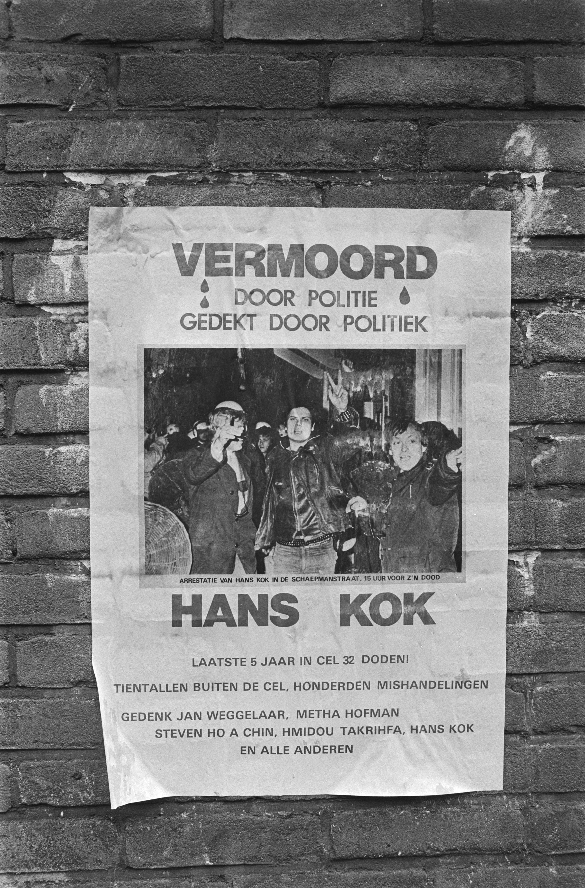 Collectie / Archief : Fotocollectie Anefo Reportage / Serie : [ onbekend ] Beschrijving : Muuropschriften in verband met dood kraker in cel Amsterdam posters Van Thijn schietend Hans Kok ("vermoorde" kraker) Datum : 11 november 1985 Locatie : Amsterdam, Noord-Holland Trefwoorden : POSTERS Persoonsnaam : Hans Kok Fotograaf : Croes, Rob C. / Anefo Auteursrechthebbende : Nationaal Archief Materiaalsoort : Negatief (zwart/wit) Nummer archiefinventaris : bekijk toegang 2.24.01.05 Bestanddeelnummer : 933-4808